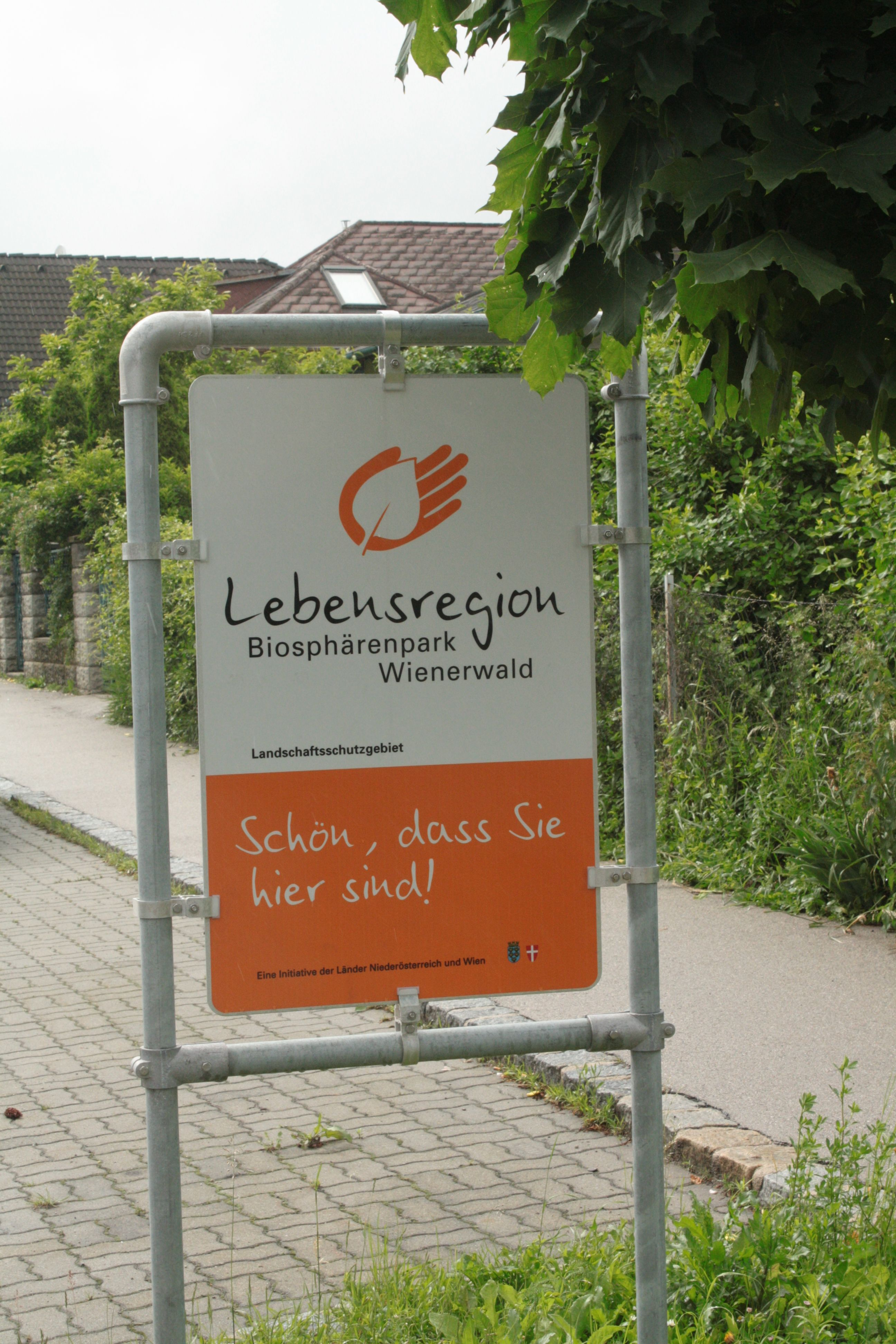 Tafel bei der Einfahrt in den Biosphärenpark Wienerwald in Pfaffstätten